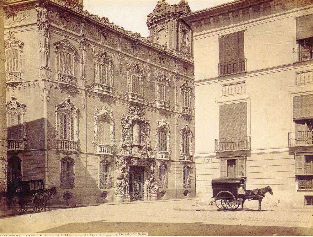 Palau del Marqués de Dosaigües de València, actual Museu de Ceràmica González Martí. Jean Laurent Minier (1816 - 1886), datat envers 1870.